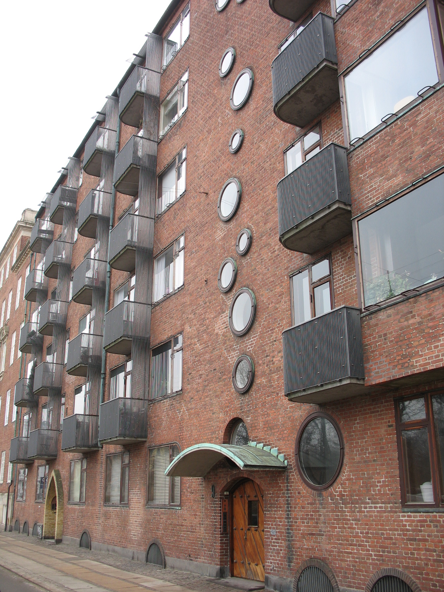 Champagnehuset on Grønningen in Copenhagen, Denmark